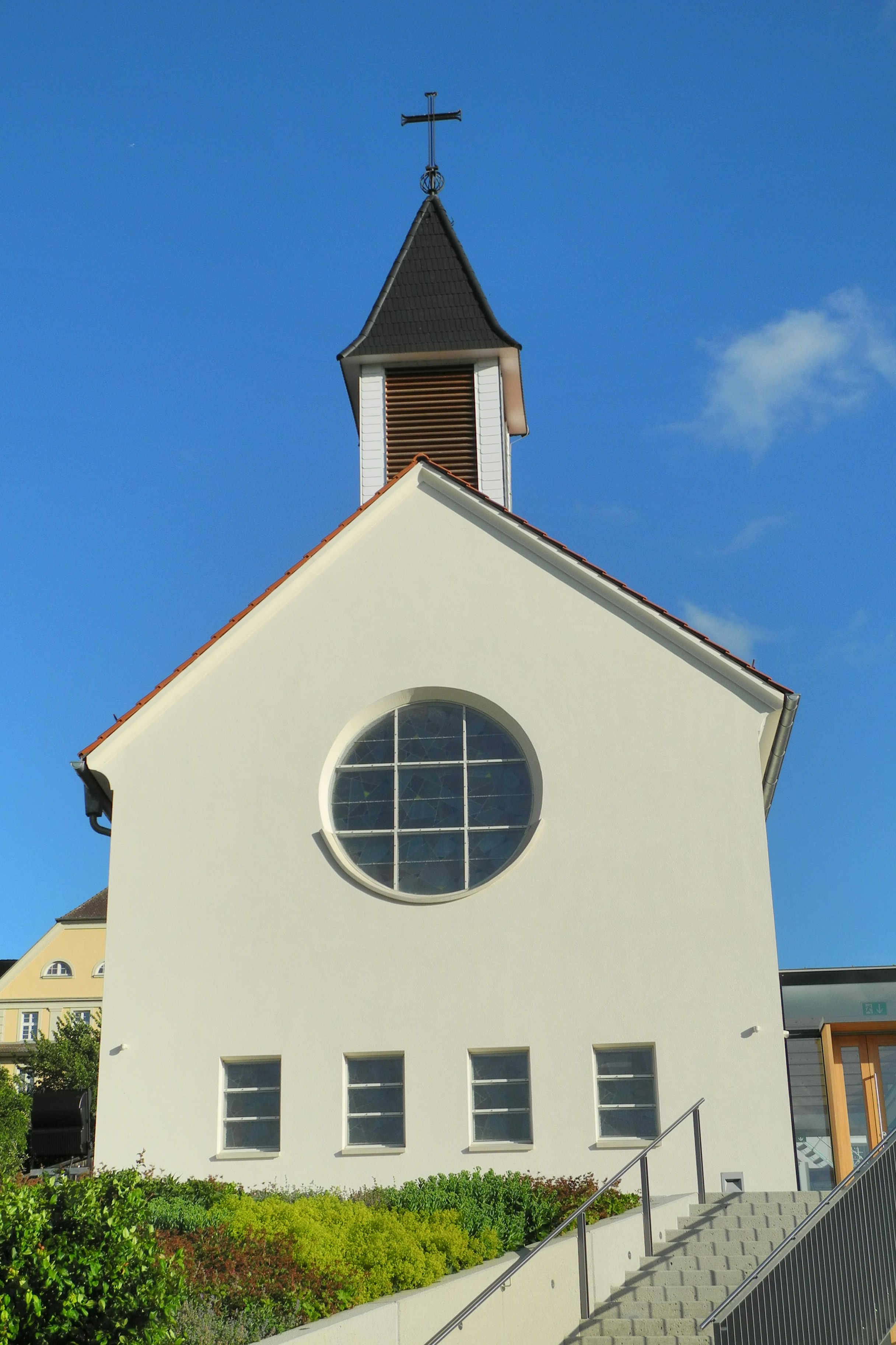 Evang. Pfarrkirche A.B. und H.B./Erlöserkirche